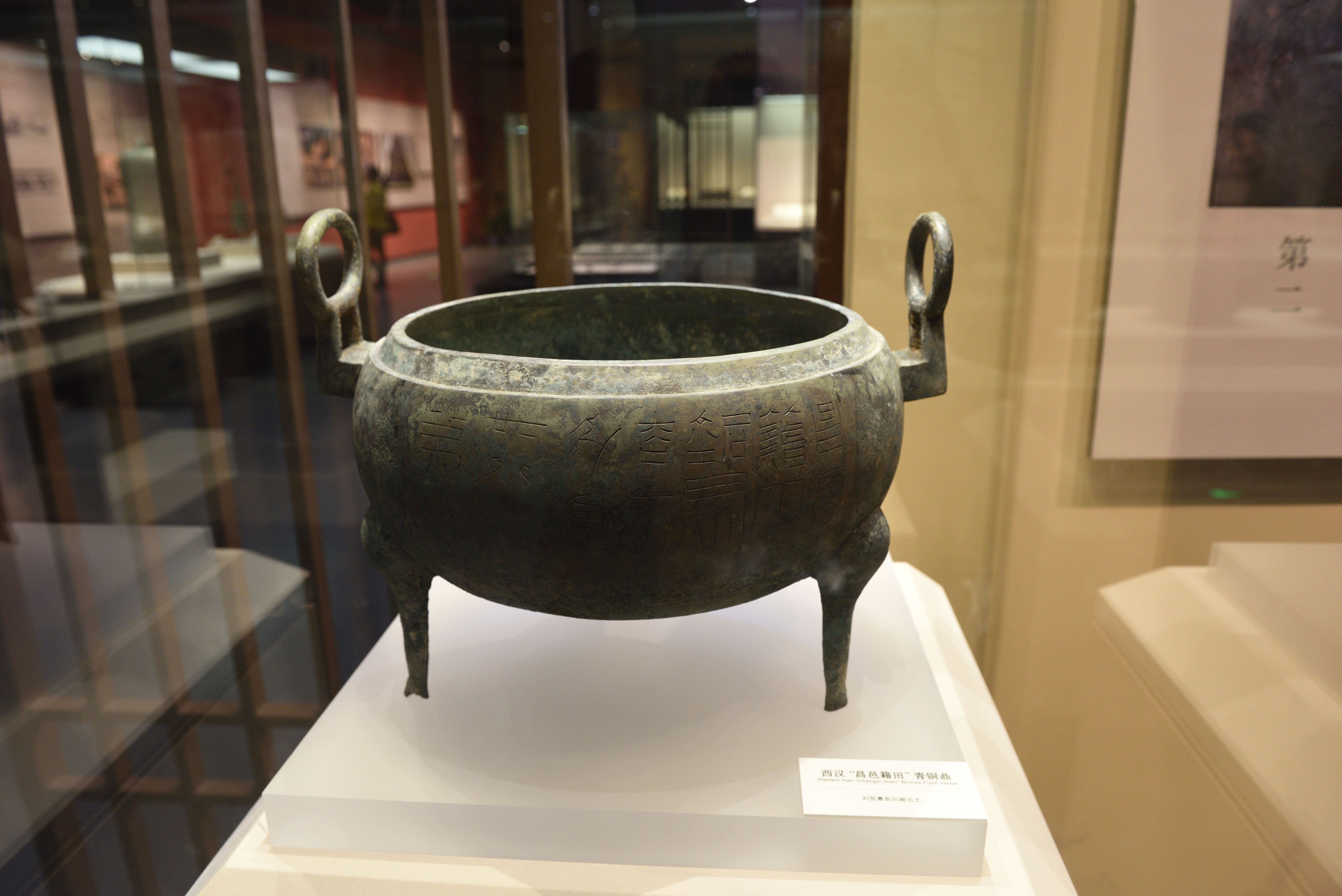 海昏侯墓出土“昌邑籍田”字样铜鼎